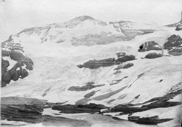 Fonds Trutat - Photographie ancienne Cote : TRU C 547 Localisation : Fonds ancien (S 30) Original non communicable Titre : Le Mont-Perdu vu de Tuquerouye, octobre 1892 Auteur : Trutat, Eugène Rôle de l’auteur : Photographe Lieu de création : Tuquerouye (Hautes-Pyrénées) Date de création : 1892 Mesures : : 9 x 12 cm Observations : Notes de la main de E. Trutat : "hémisph. Darlot f. 11, papier en rouleau Eastman?" Mot(s)-clé(s) : -- Montagne -- Vallée -- Pierre -- Lac -- Eau -- Neige -- Automne -- Mont-Perdu (Hautes-Pyrénées) -- Tuquerouye (Hautes-Pyrénées) -- Hautes-Pyrénées (Midi-Pyrénées) -- Pyrénées (France) -- Tuquerouye, Refuge de (France) -- 19e siècle, 4e quart Médium : Photographies -- Négatifs sur papier -- Noir et blanc -- Eastman -- Paysages Bibliothèque de Toulouse. Domaine public